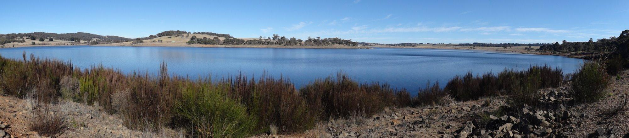 Lac d'Obéron, Nouvelle-galles du sud, Australie.